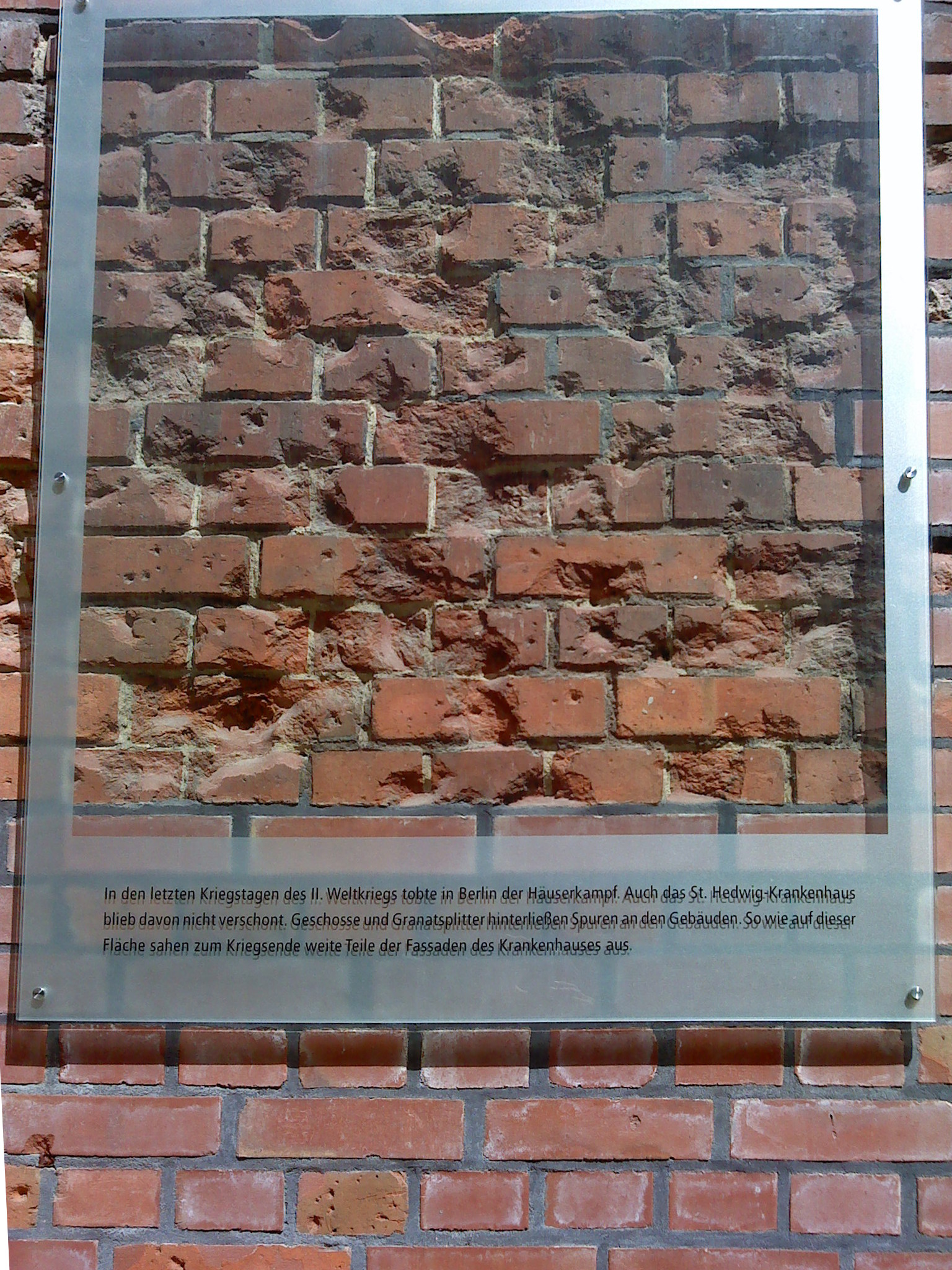 St. Hedwig-Krankenhaus: Haupthaus, Nordflügel (Haus Monika) mit bewusst erhaltenen Kriegsschäden